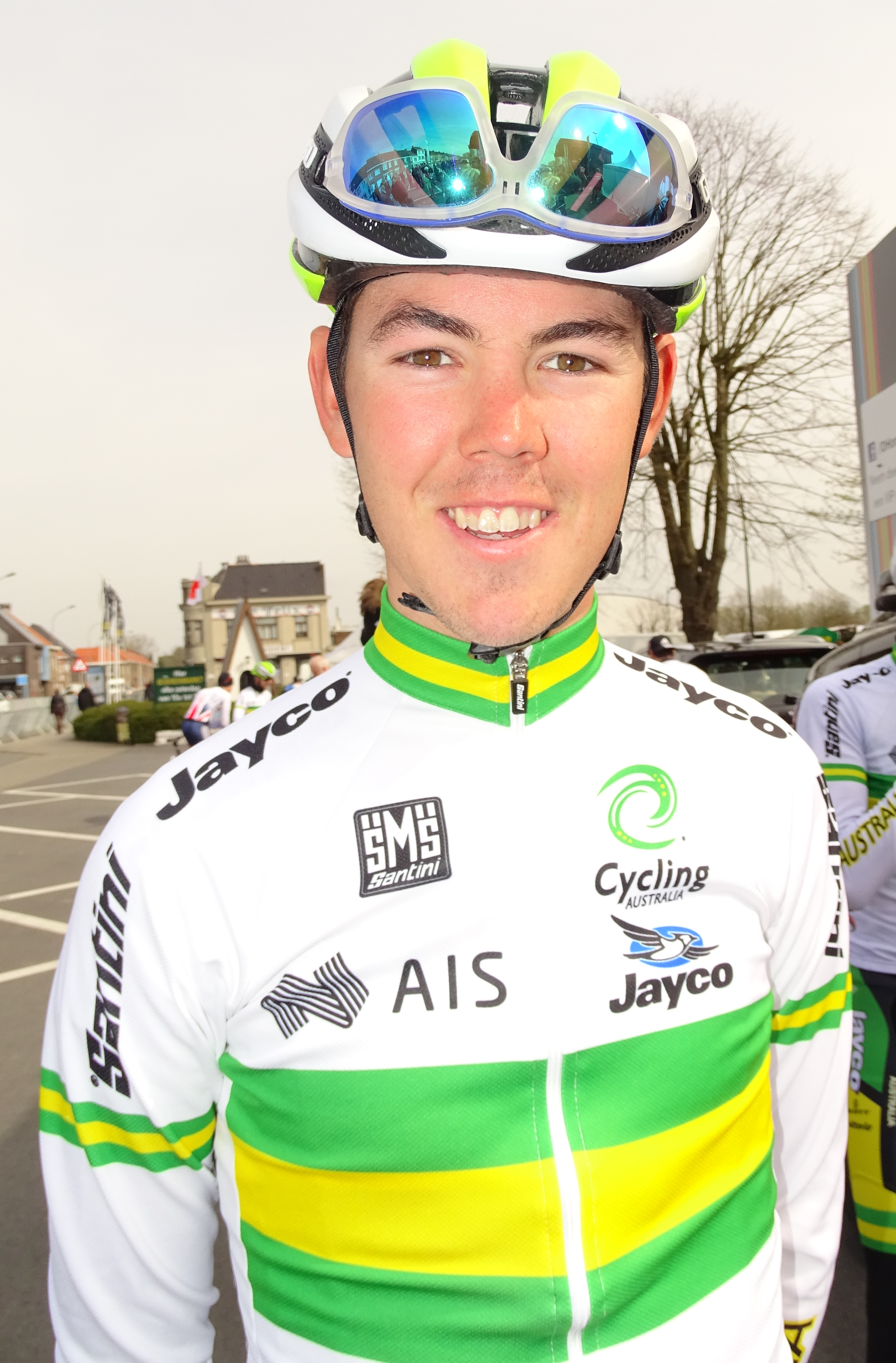 Reportage réalisé le samedi 9 avril à l'occasion du départ et de l'arrivée du Tour des Flandres espoirs 2016 à Audenarde, Belgique.